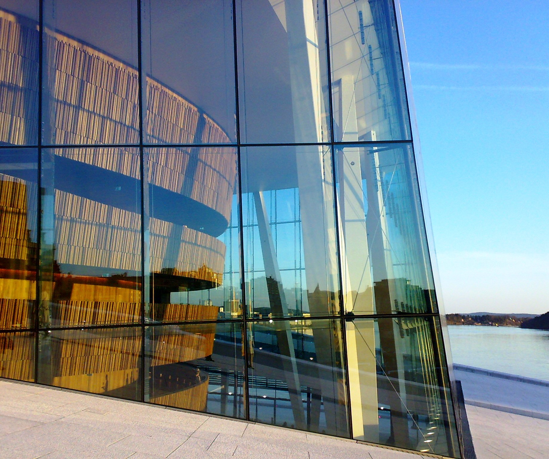 Operaen i Oslo på andre åpningsdag, 2008.